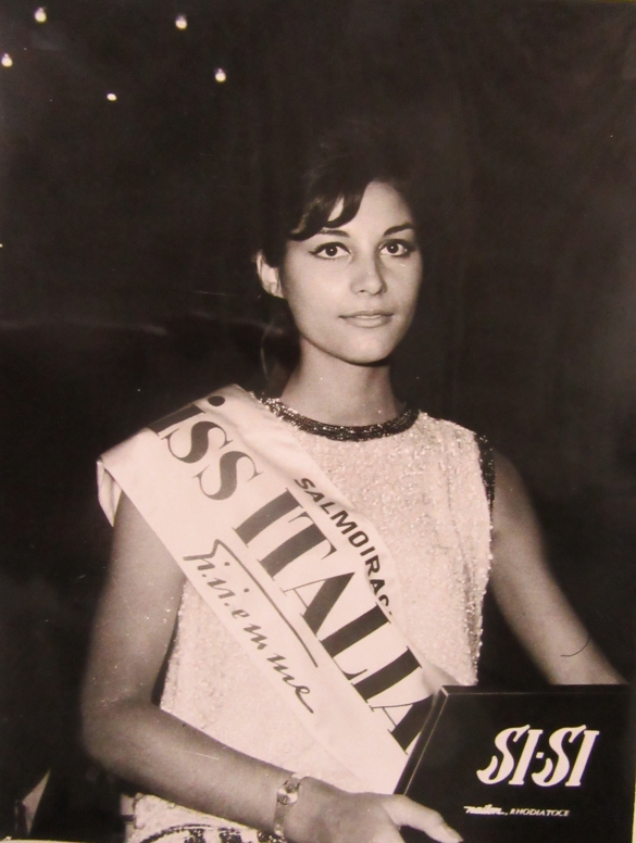 Miss Italia 1964 Mirka Sartori